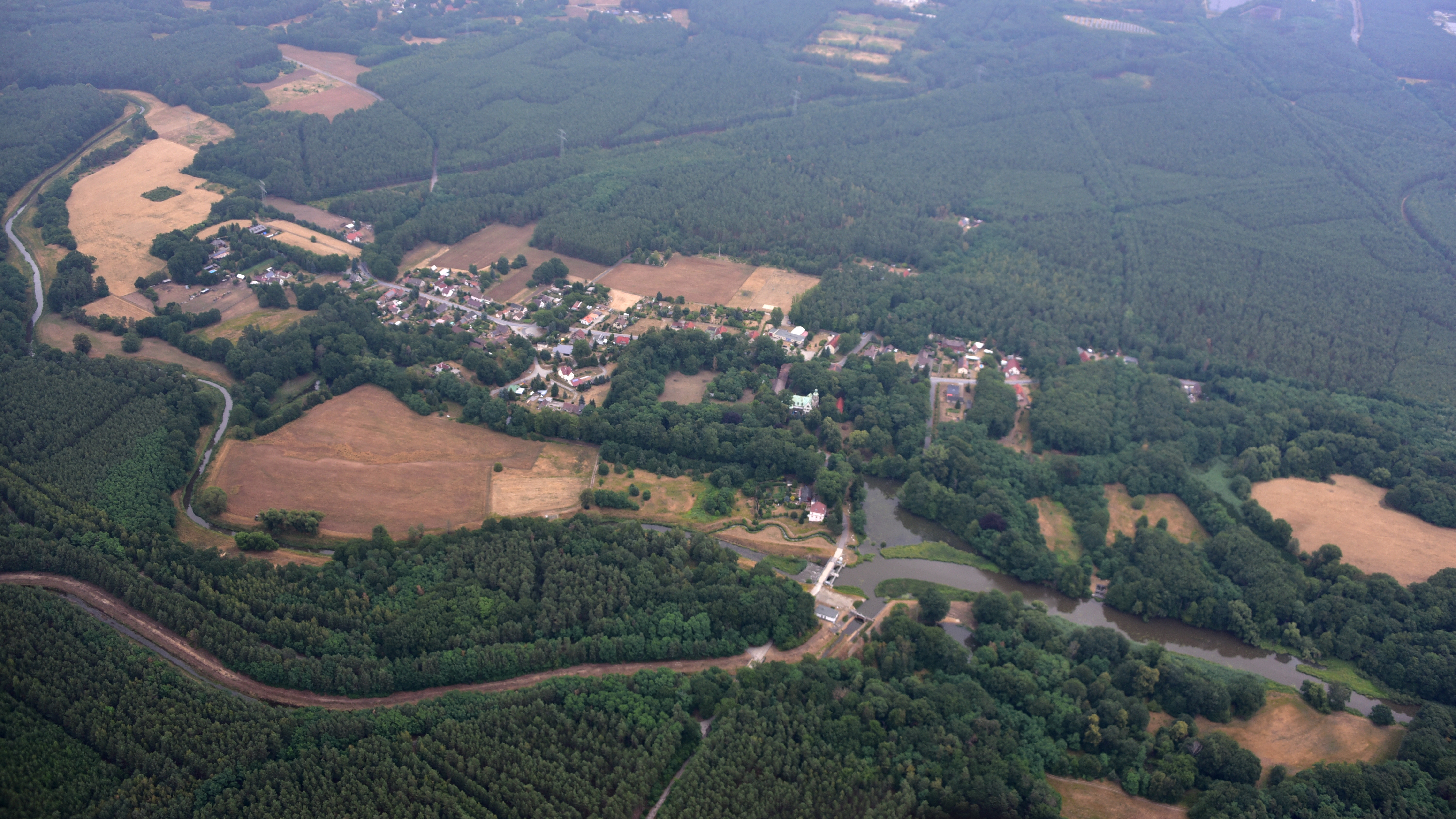 Bärwalde (Boxberg), Luftaufnahme (2019) Hornjoserbsce: Powětrowy wobraz Bjerwałda (2019)